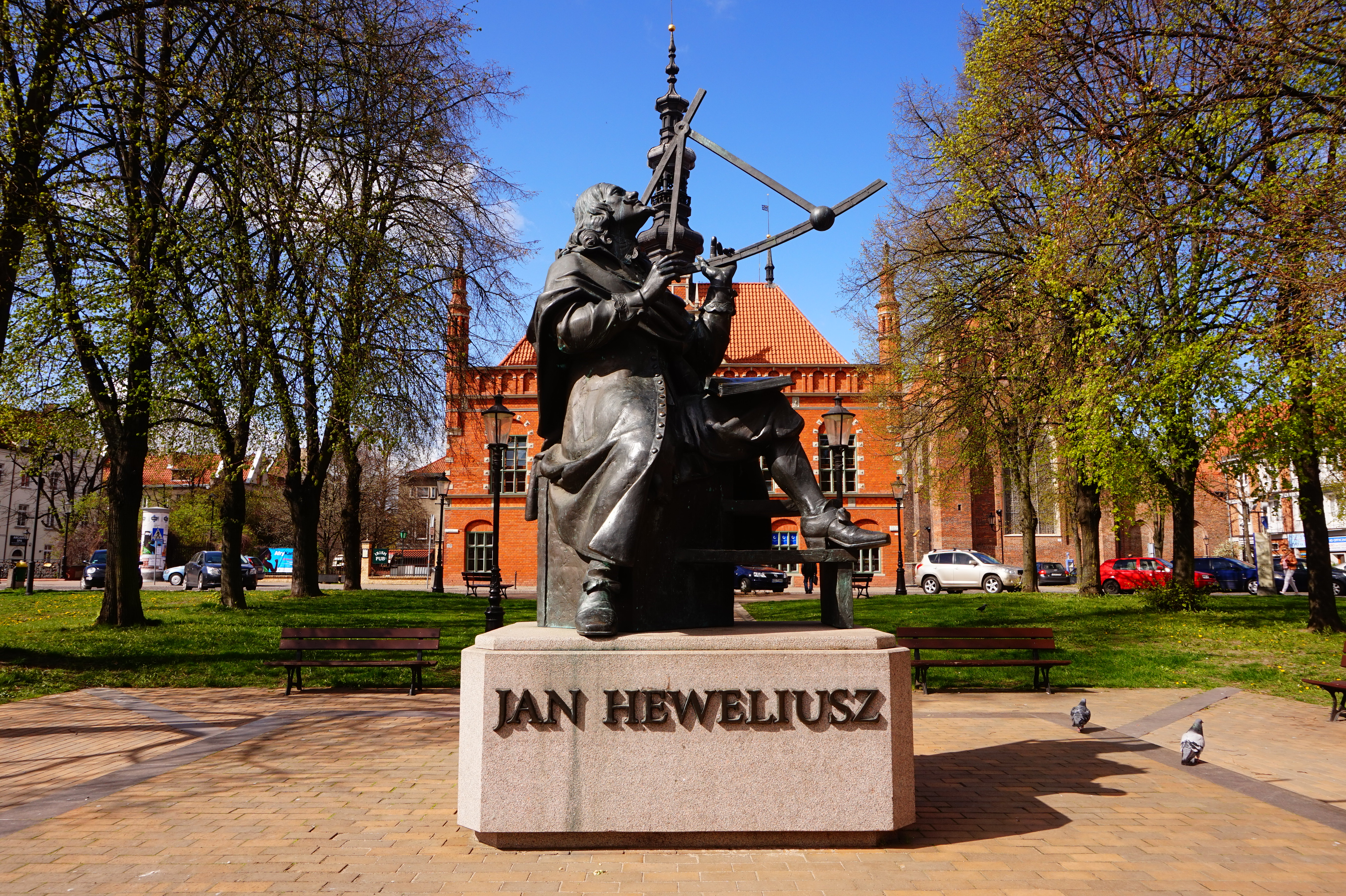 Gdańsk. Pomnik Jana Heweliusza